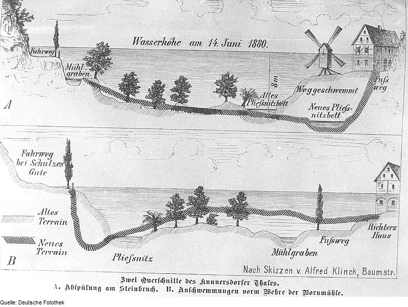 Original image description from the Deutsche Fotothek Pließnitztal in Kunnersdorf auf dem Eigen mit Bockmühle, aus: Die Wassersnoth in der Königl. Sächs. Oberlausitz am 14. Juni 1880